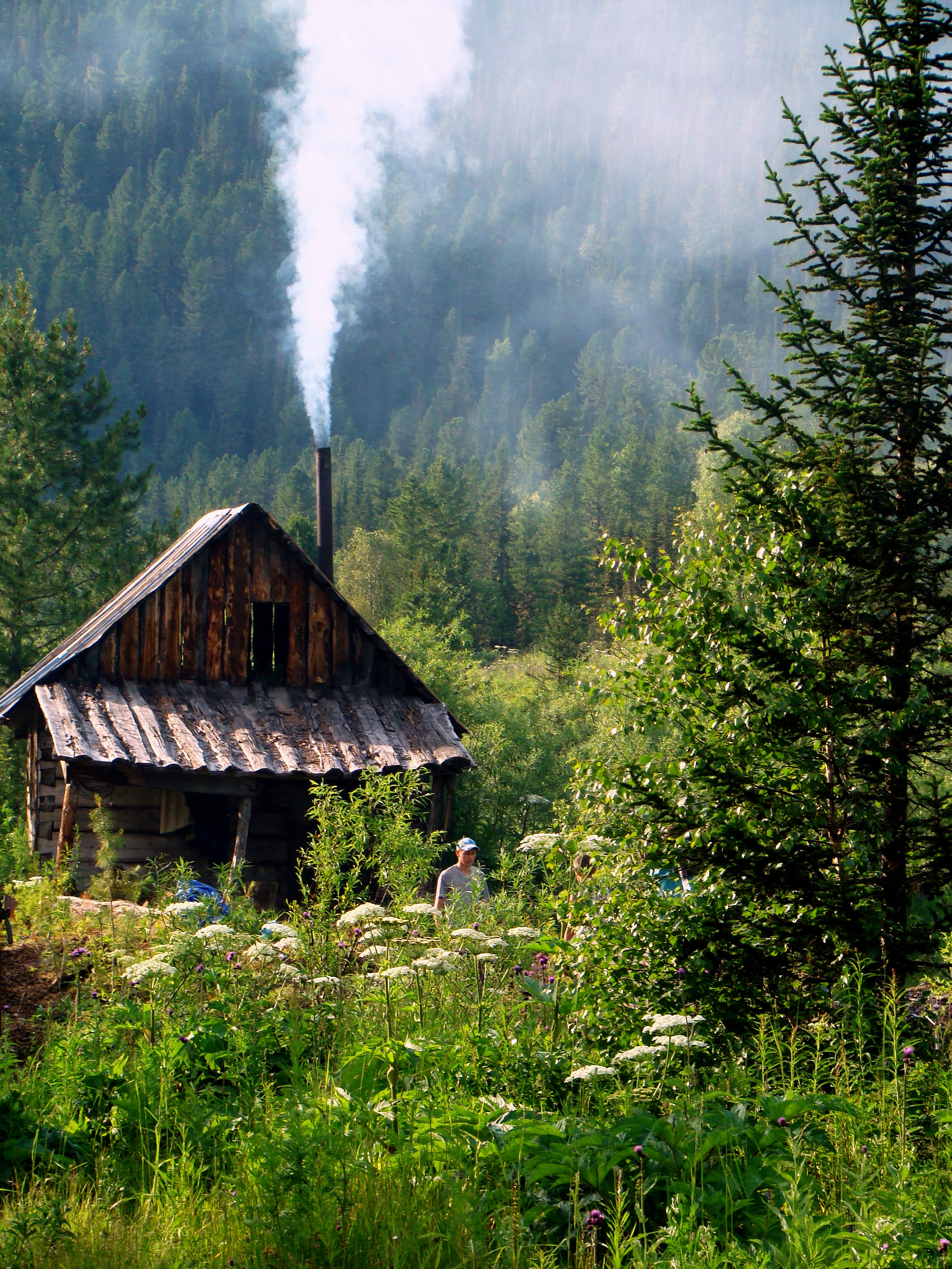 Баня на берегу Телецкого озера на одном из кордонов.